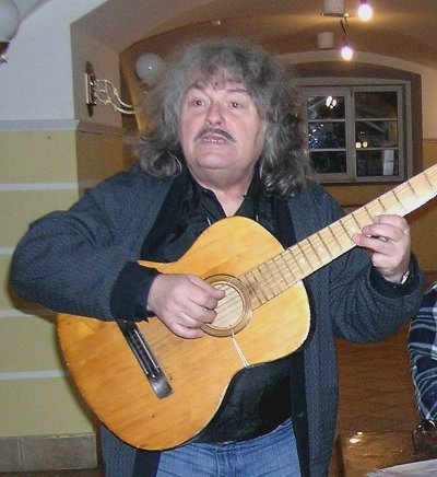 Лобановский Александр Николаевич foto by ARB. Фотография сделана мной для wiki.